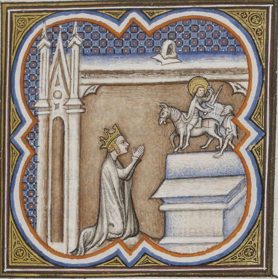 Miniature extraite des « Grandes Chroniques de France », montrant Sainte Clothilde priant Saint Martin.